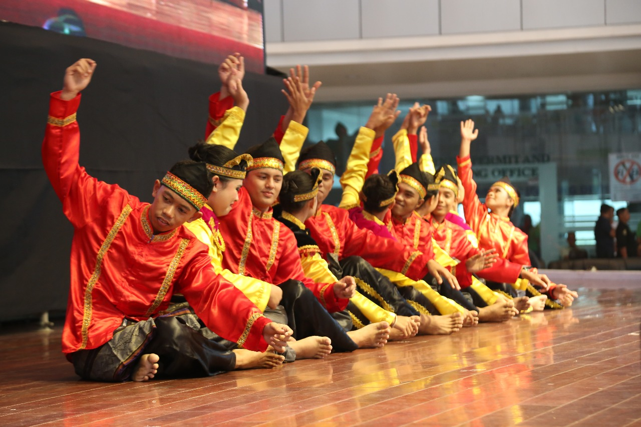 Tarian Indang Badinding